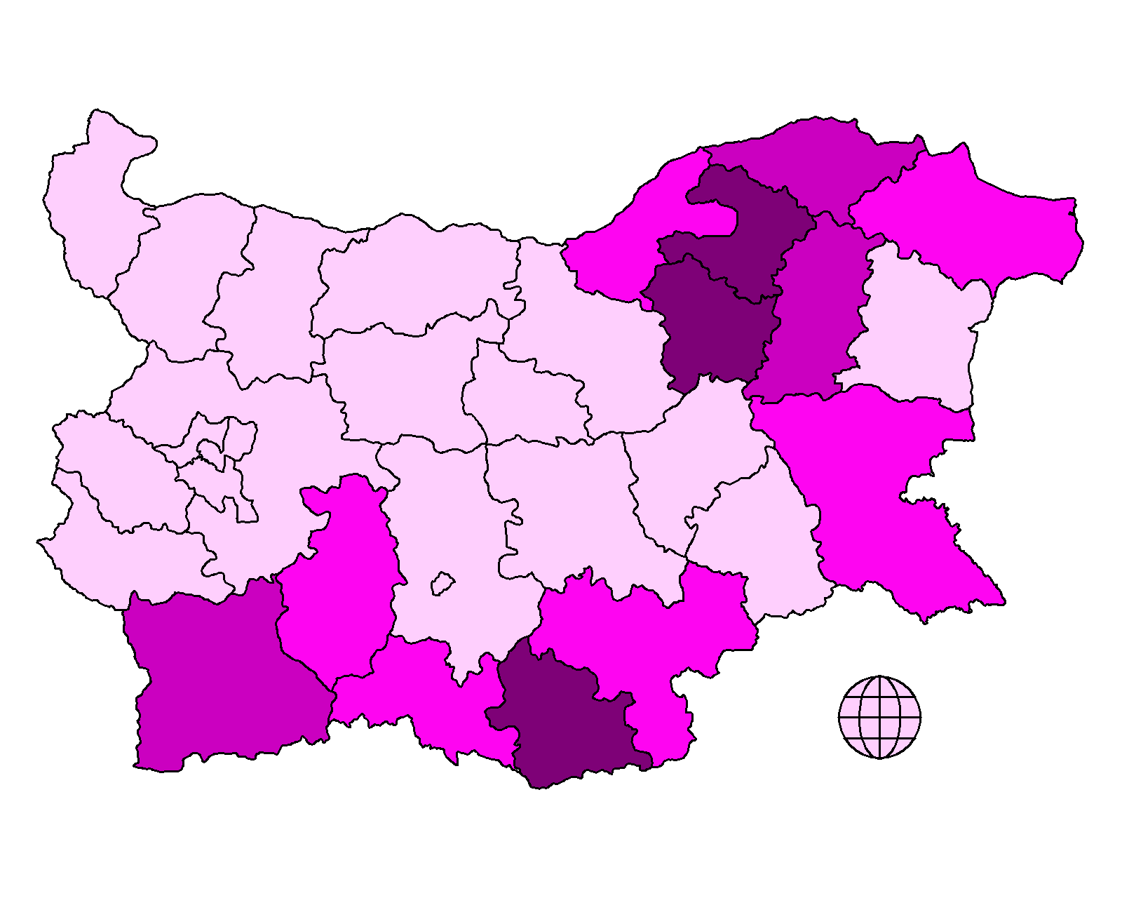 Гласуване по райони за ДПС на изборите за Европейски парламент през 2007. Всеки от цветовете съответства на приблизително 1/4 от подадените гласове По тъмният цвят съответства на получен по-голям процент от гласовете